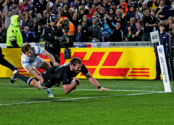 COUPE DU MONDE DE RUGBY 2011 NOUVELLE ZELANDE ARGENTINE